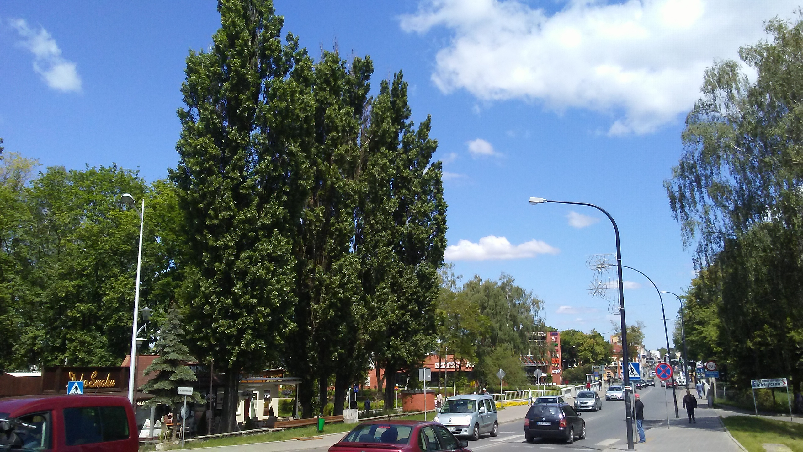 Teren Kuźnic Tomaszowskich obecnie, Tomaszów Mazowiecki, początek ulicy św.Antoniego i Warszawskiej